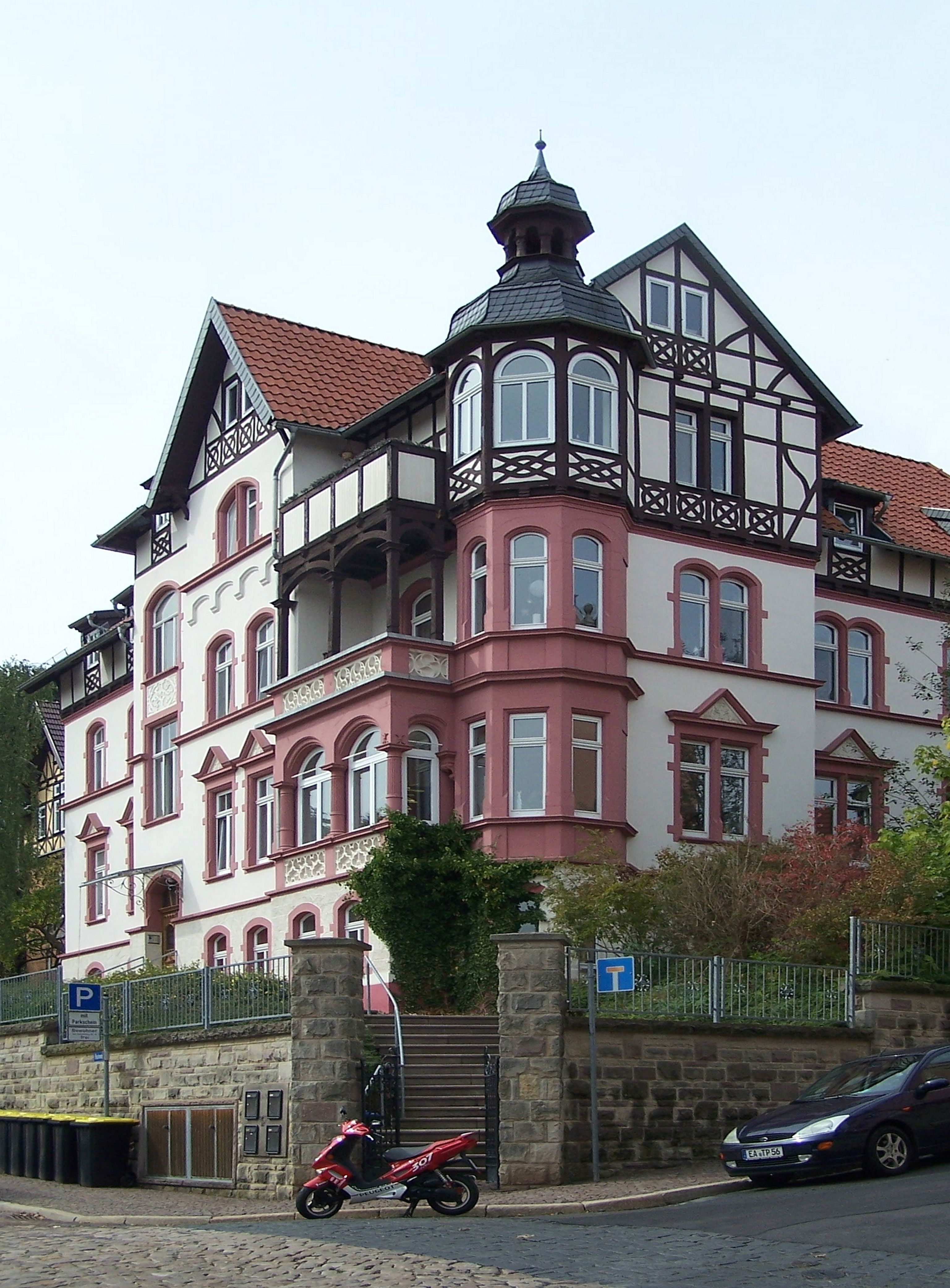 Das Haus Hainweg 20 wurde im Jahr 1901 vom Architekten Gustav Stein entworfen und für den Lehrer Höhn erbaut.